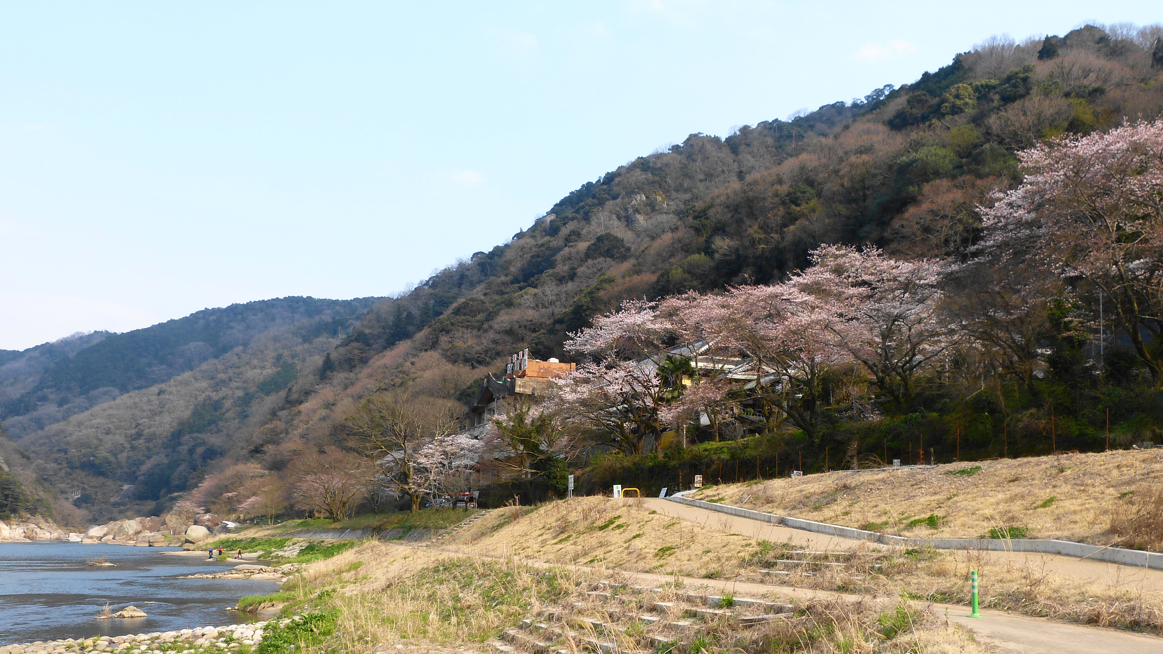 木津川と笠置山。京都府相楽郡笠置町にて。